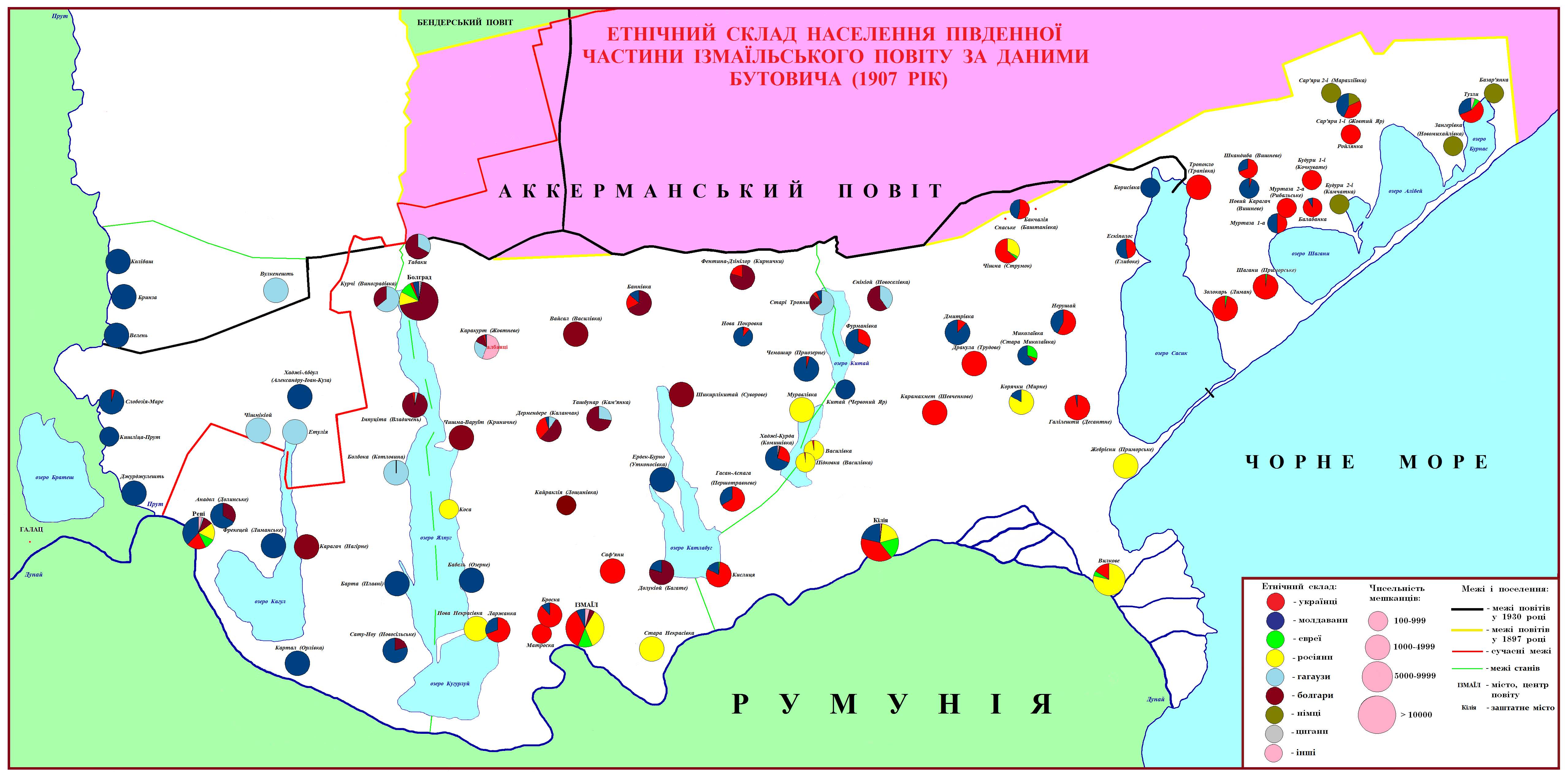 карта етнічного складу населення Ізмаїльського повіту за даними Бутовича